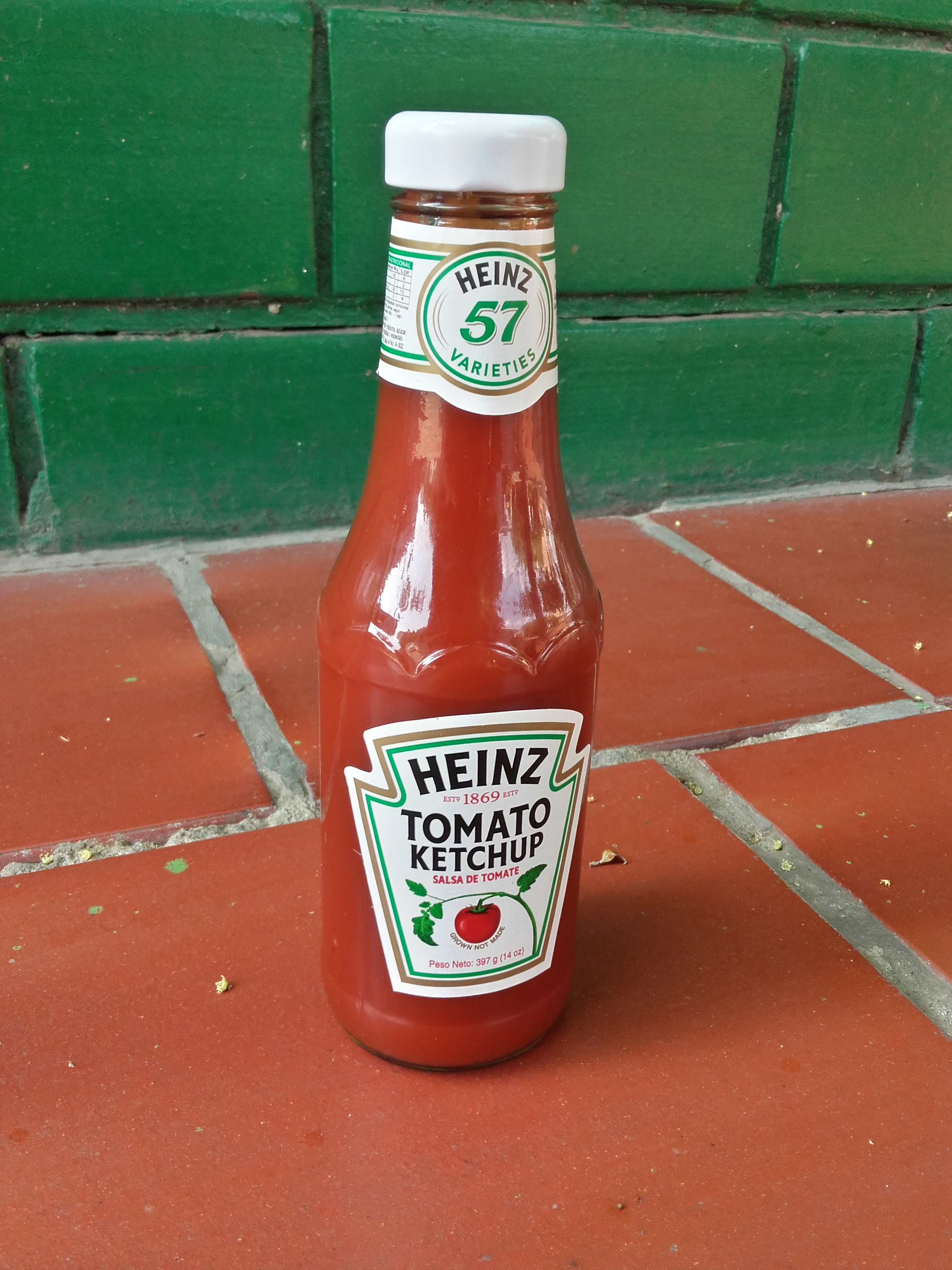 dnfnnfnfnfn